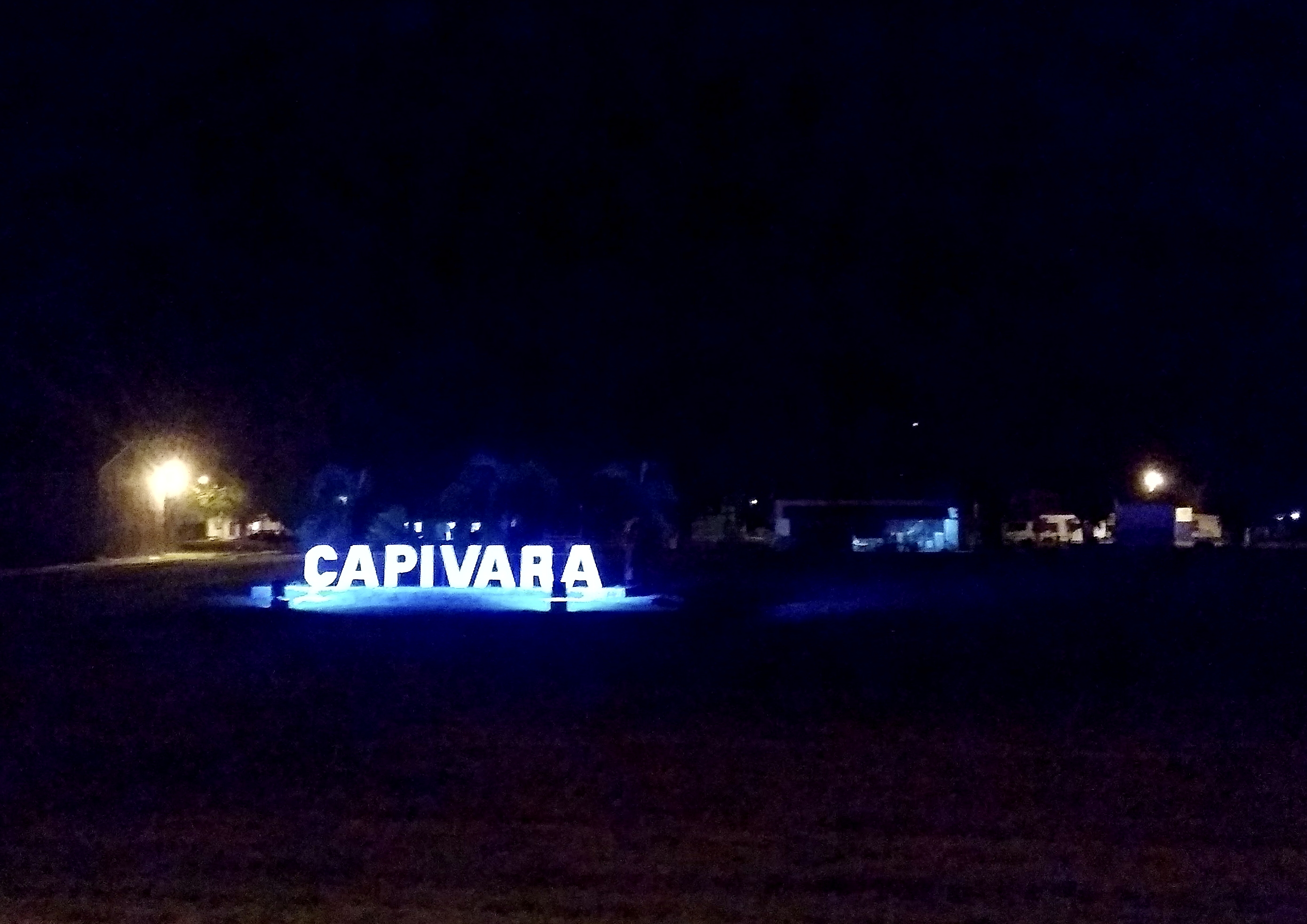 Capivara, Departamento San Cristóbal, Santa Fe, Argentina